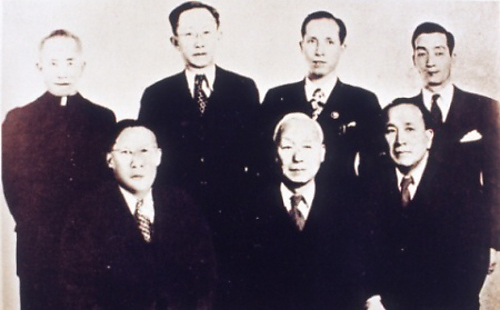 1945년 5월 미국 샌프란시스코 국제회의에 파견된 대한민국임시정부 구미위원(뒷줄 왼쪽부터 시계방향으로 윤병구·정한경·유경상·임병직, 앞줄 왼쪽부터 이살음·대표단장 이승만·송헌주 순)